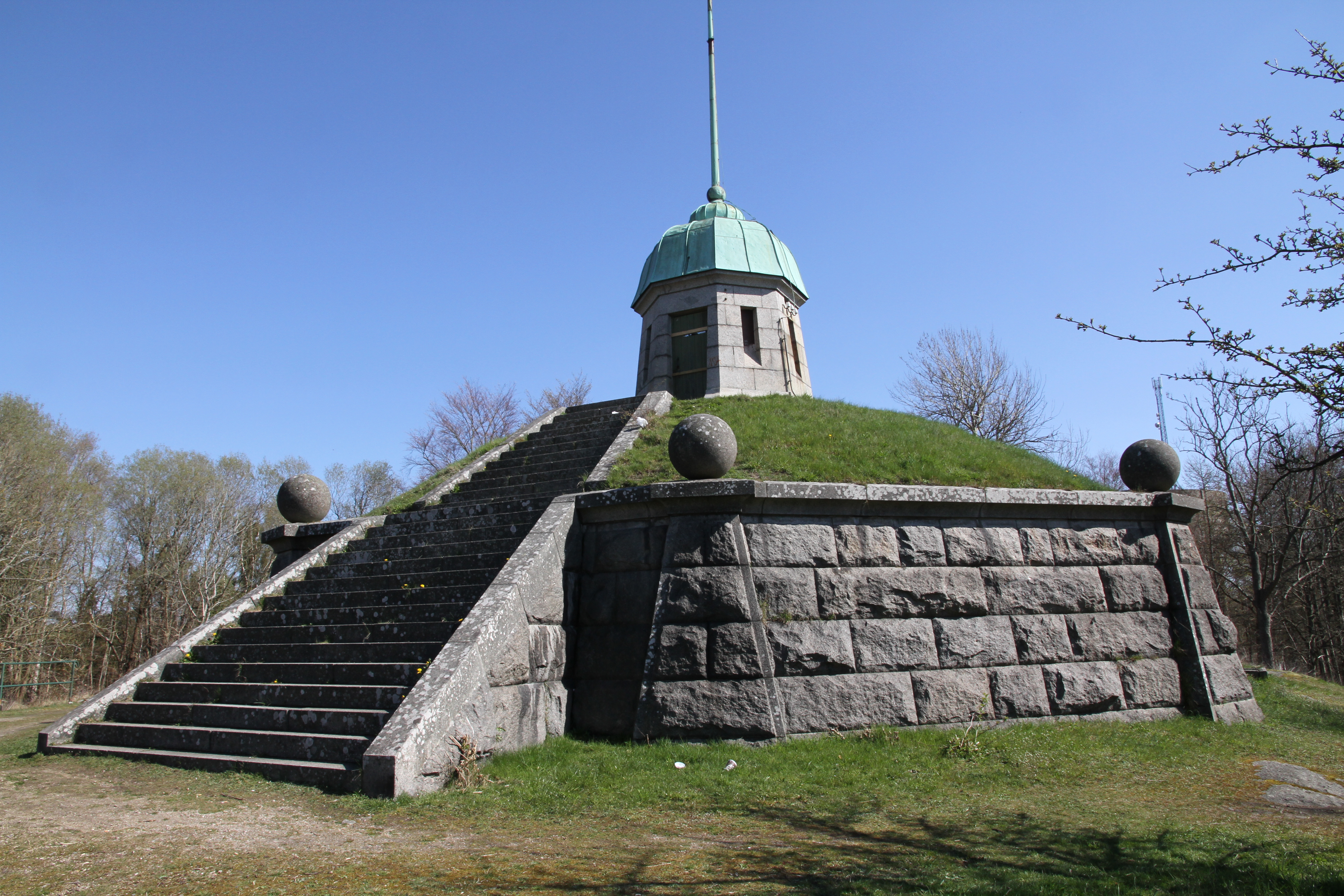 Karlshamns gamla vattentorn